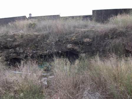 Sima de la Pedrera en Benicull